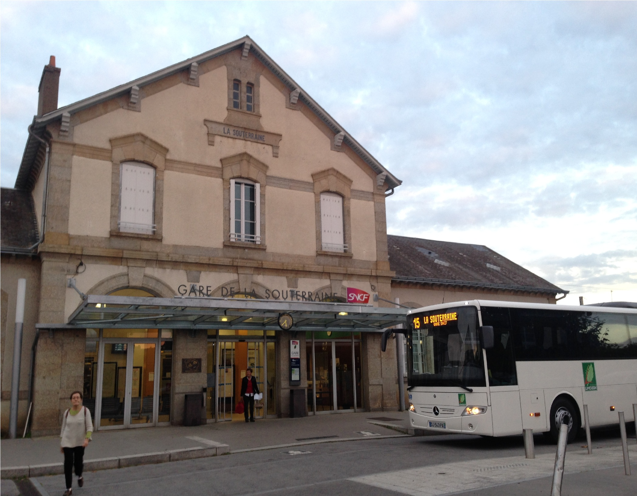 Gare de La Souterraine avec un autobus